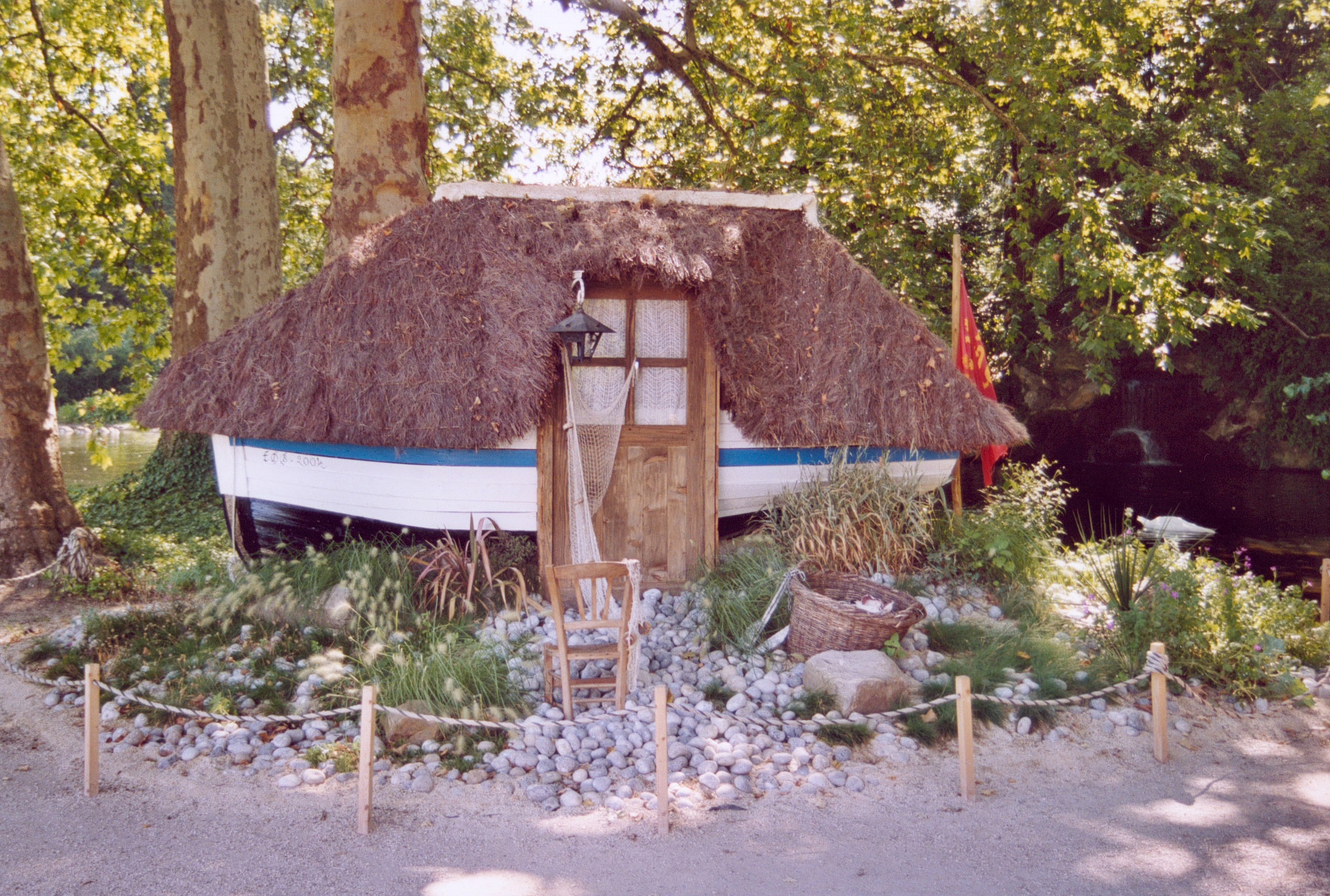 Paris Parc de Bagatelle exposition 2004 Les cabanes Auteur : GIRAUD Patrick